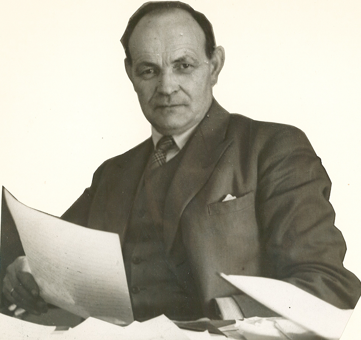 August Bendix Christofer Nielsen (1877–1956), norsk arkitekt, reguleringssjef i Aker og medlem av herredsstyret. Ukjent fotograf, ca. 1930–40. Fra Byhistorisk samling hos Oslo Museum.